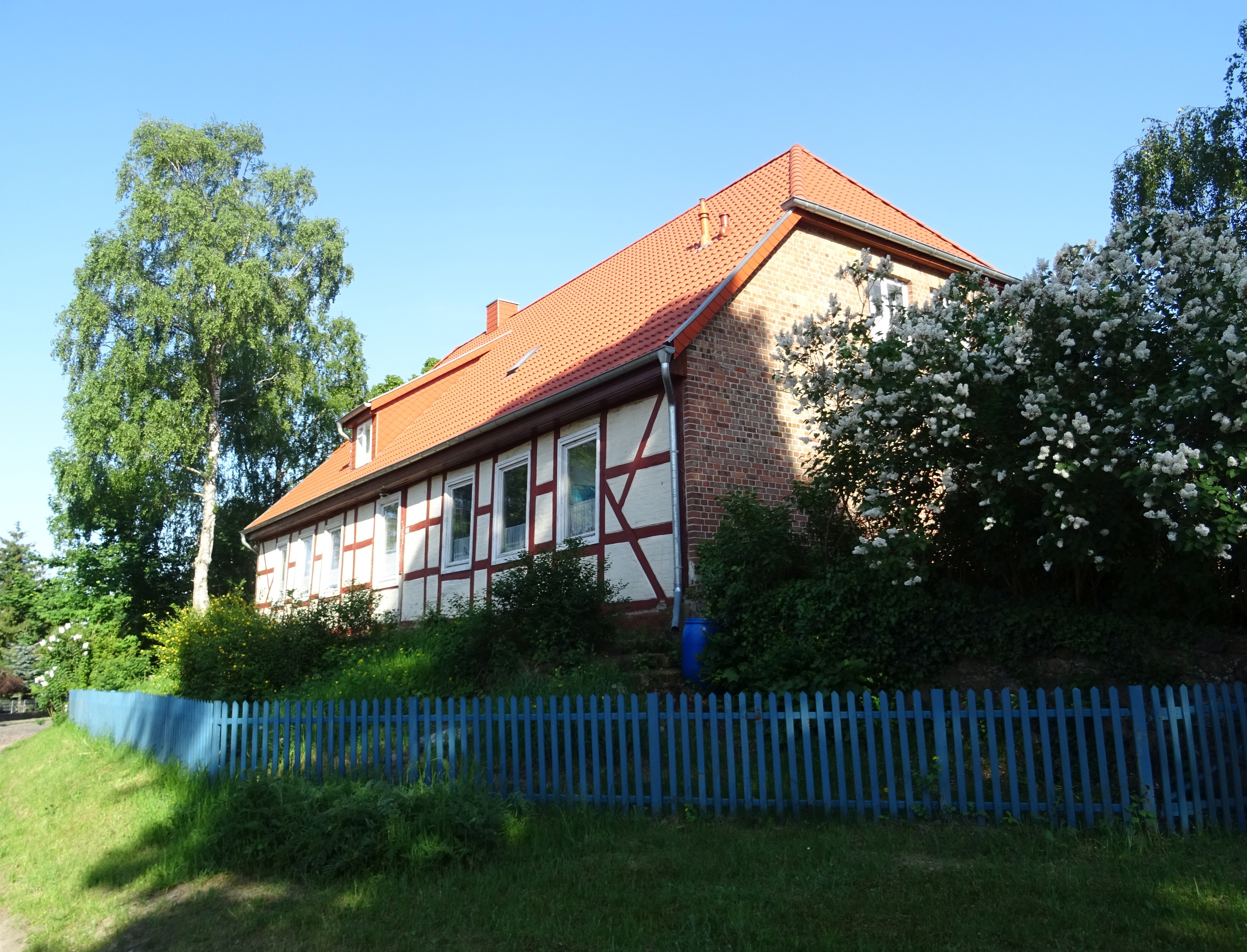 Eldena, Altonaer Str 2a. Das Wohnhaus steht auf einem denkmalgeschützten Gewölbekeller, Rest der alten Klosteranlage Eldena